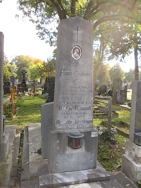 Karl Komzák III 1878-1924 Grabstätte